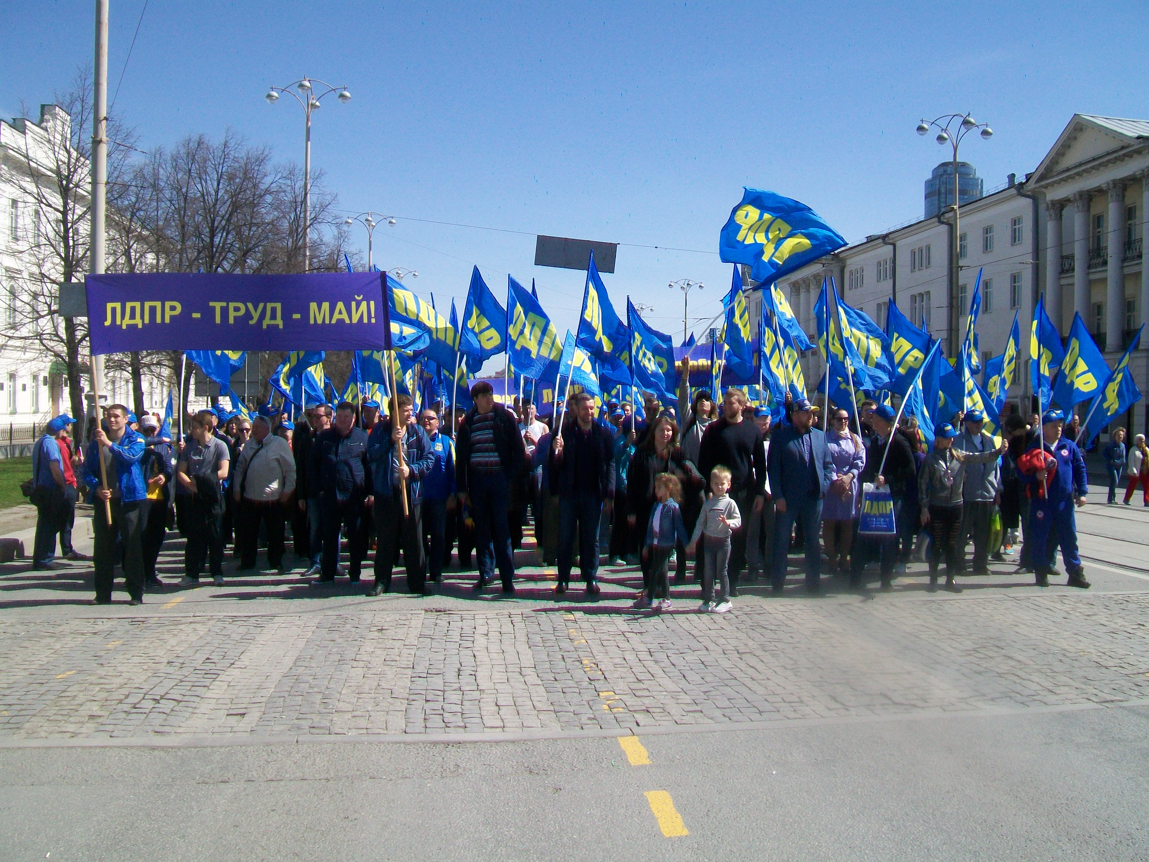 Колонна ЛДПР на Первомайском шествии в Екатеринбурге, 1 мая 2017 года